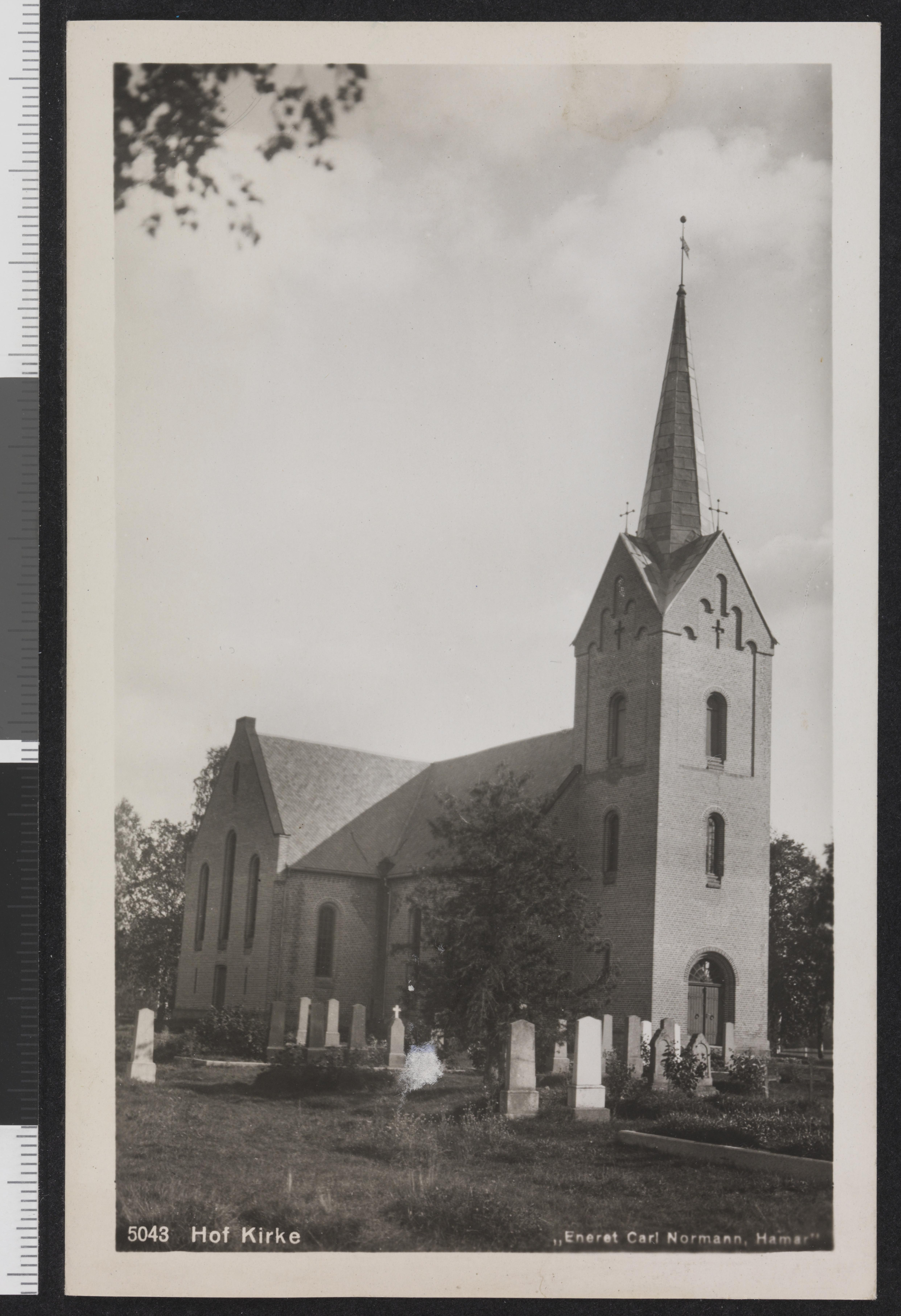 Bildet er hentet fra Nasjonalbibliotekets bildesamling Hof,Hof kirke, Åsnes, Hedmark